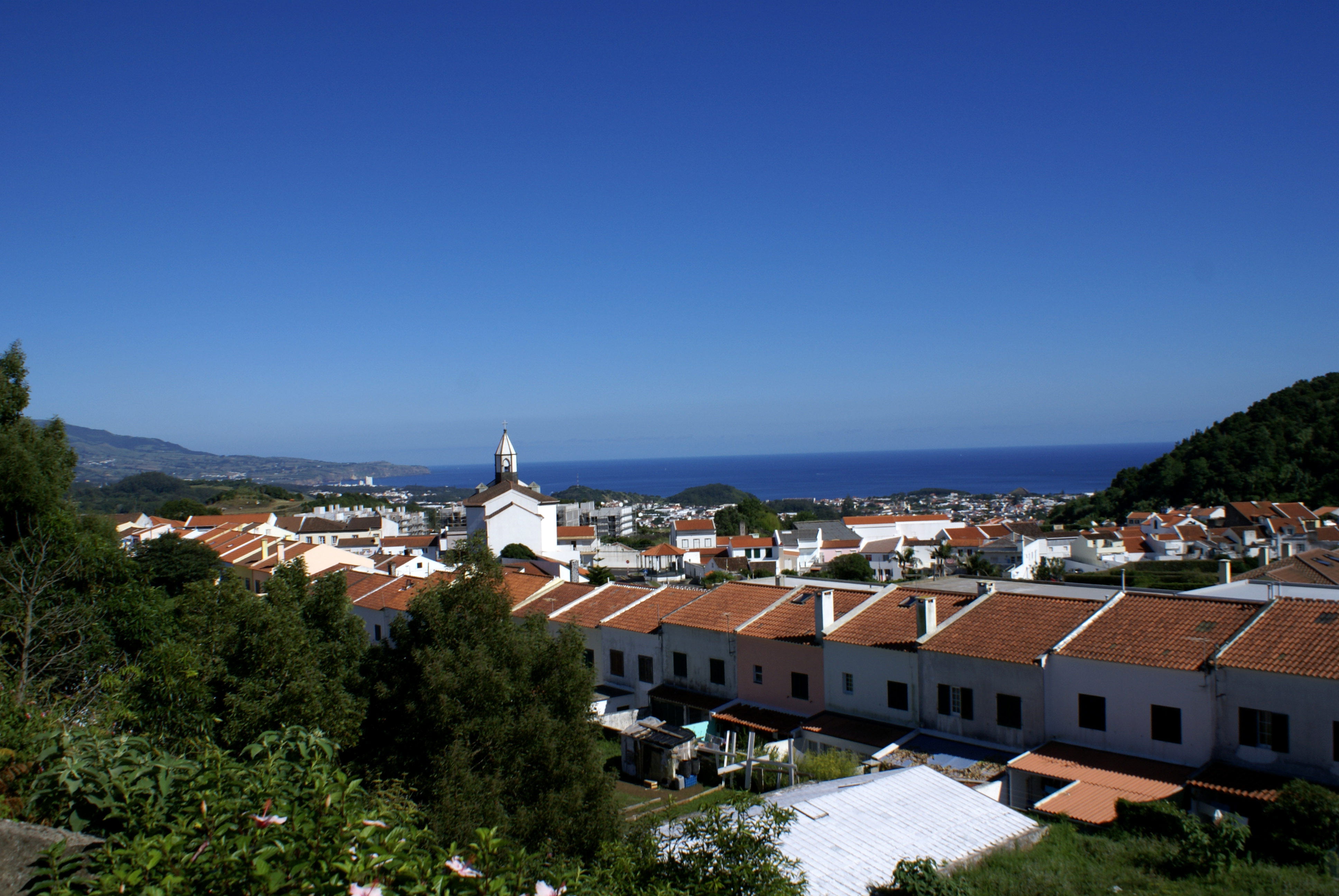 Miradouro das Provincias, Fajã de Cima, ilha de São Miguel, Açores